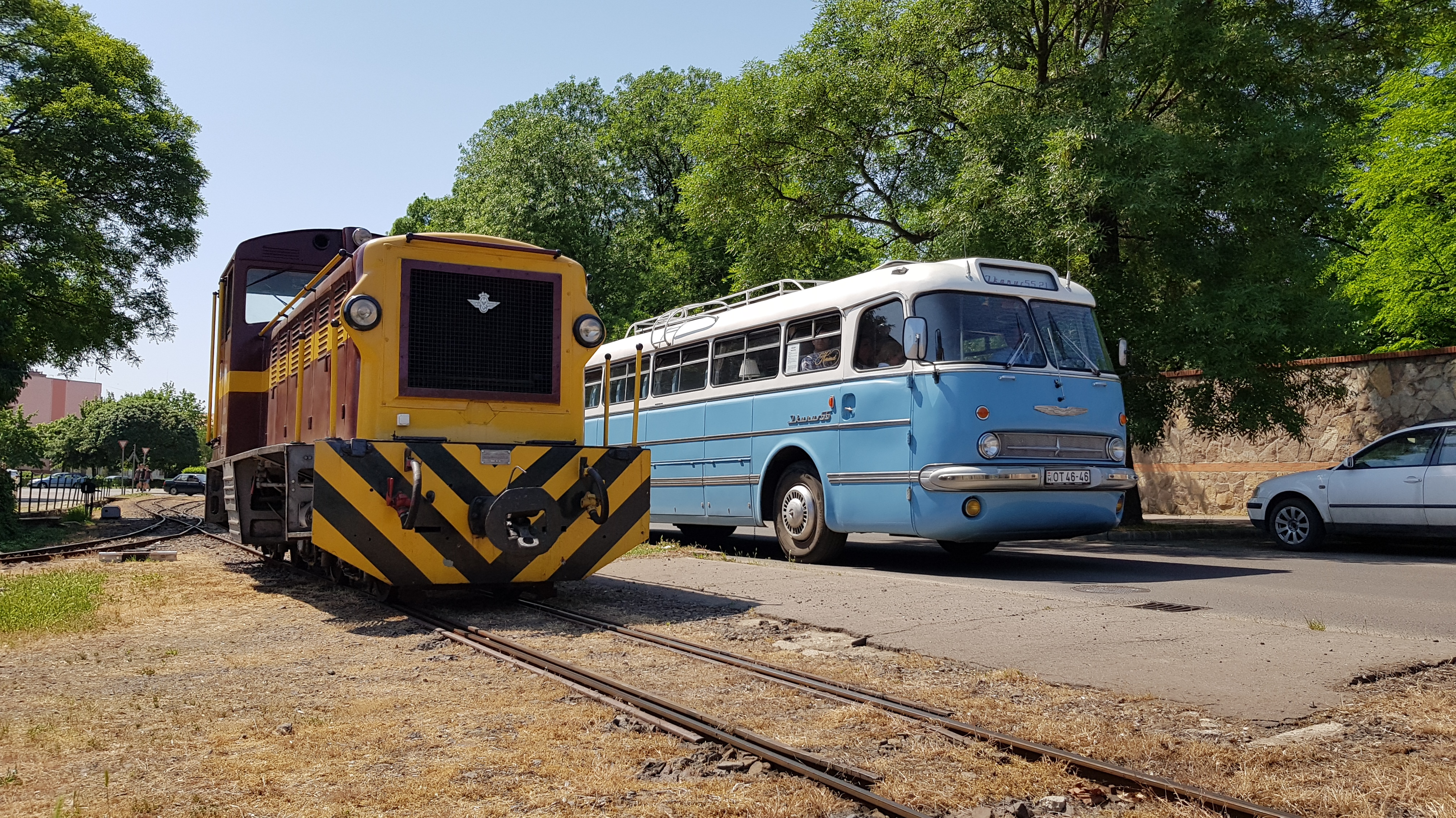 Mk.48-412 egy Ikarus 55-ös társaságában.